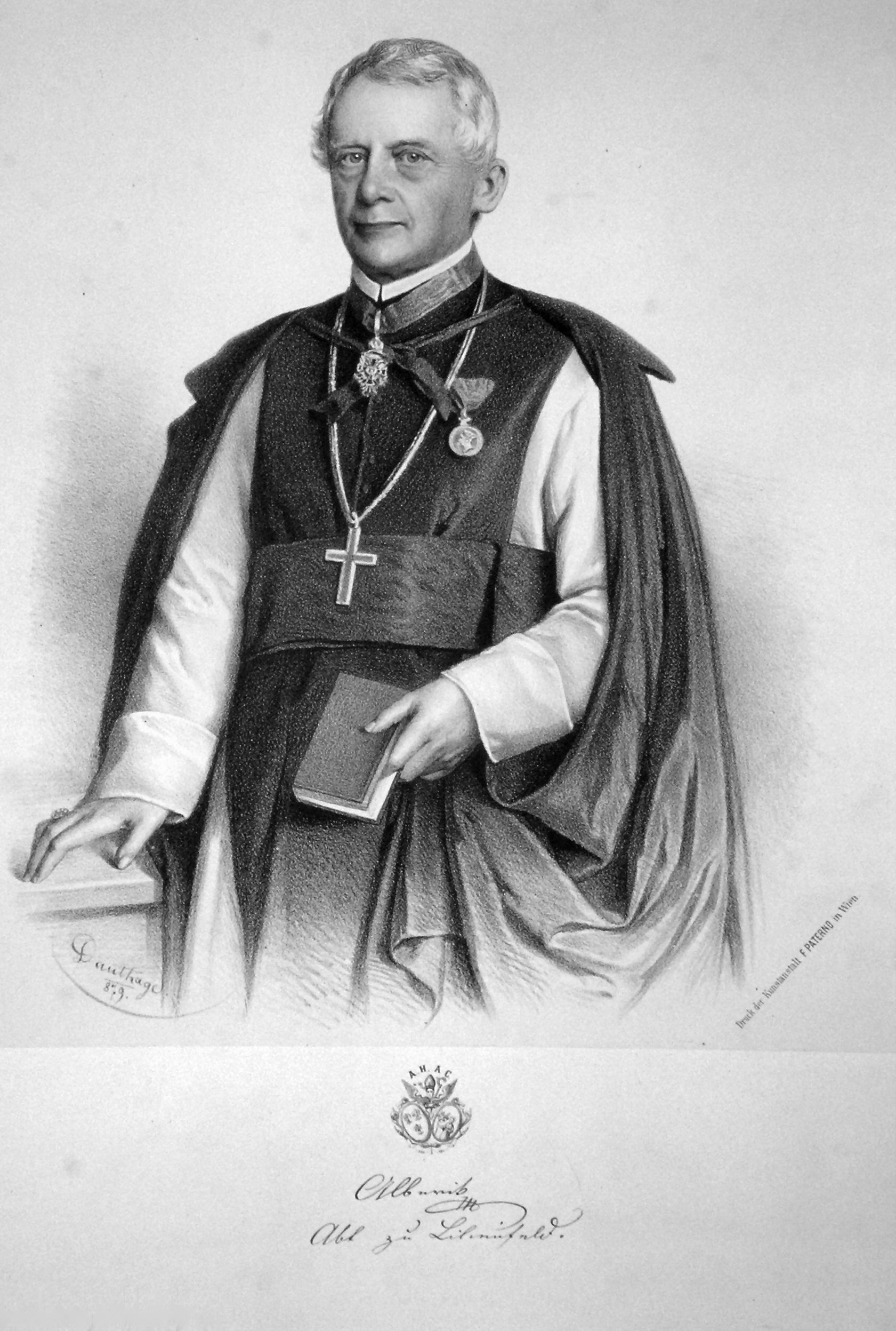 Alberich Heidmann (1808-1898), Abt des Zisterzensier-Stiftes Lilienfeld. Lithographie von Adolf Dauthage, 1879